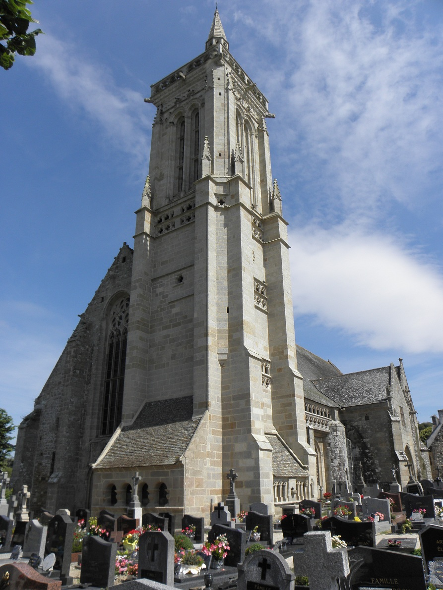 Tour de l'aglise de Saint-Jean-du-Doigt (29). .